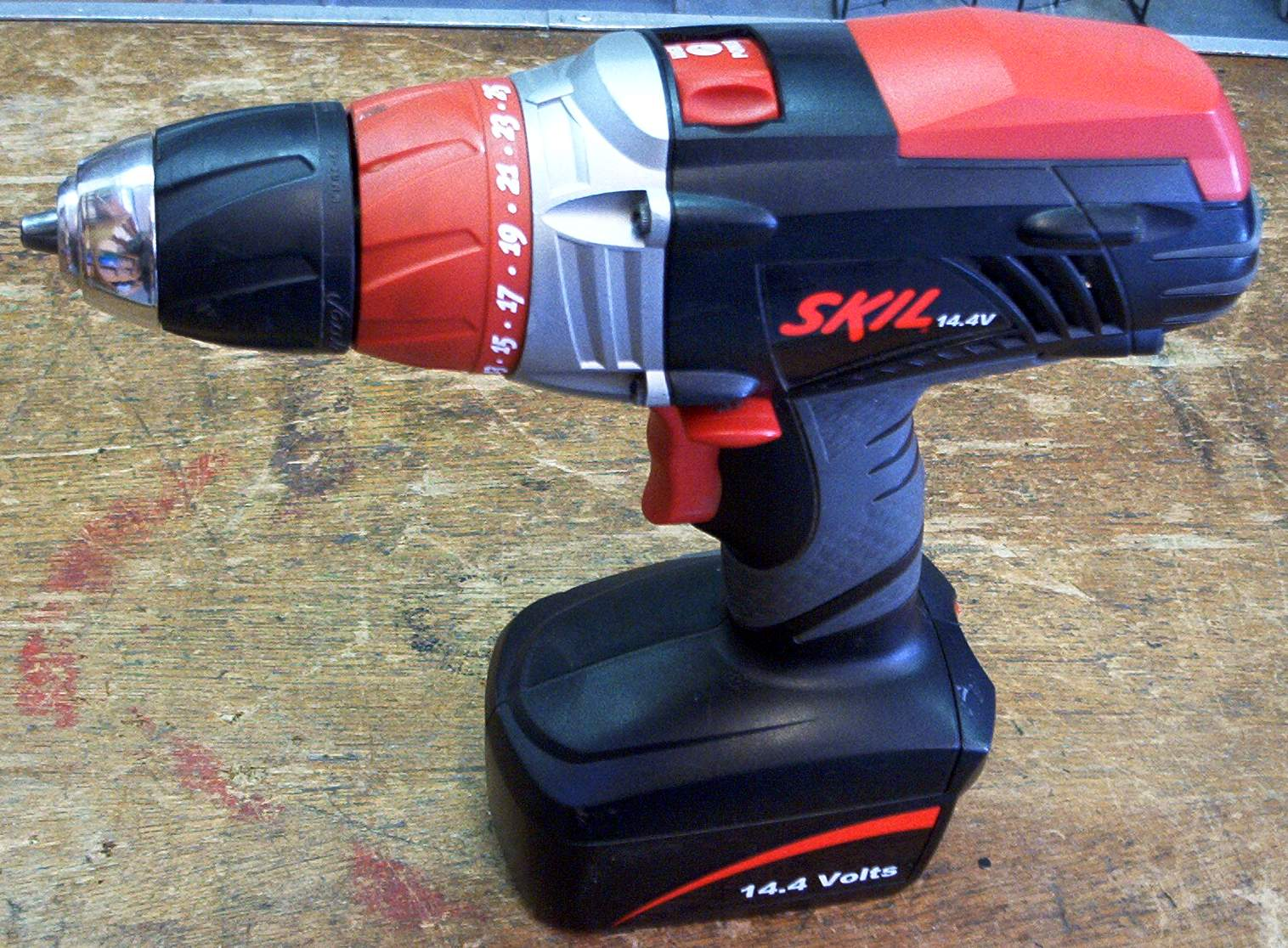 zelf gemaakte foto voor het publiek domein. Martink.